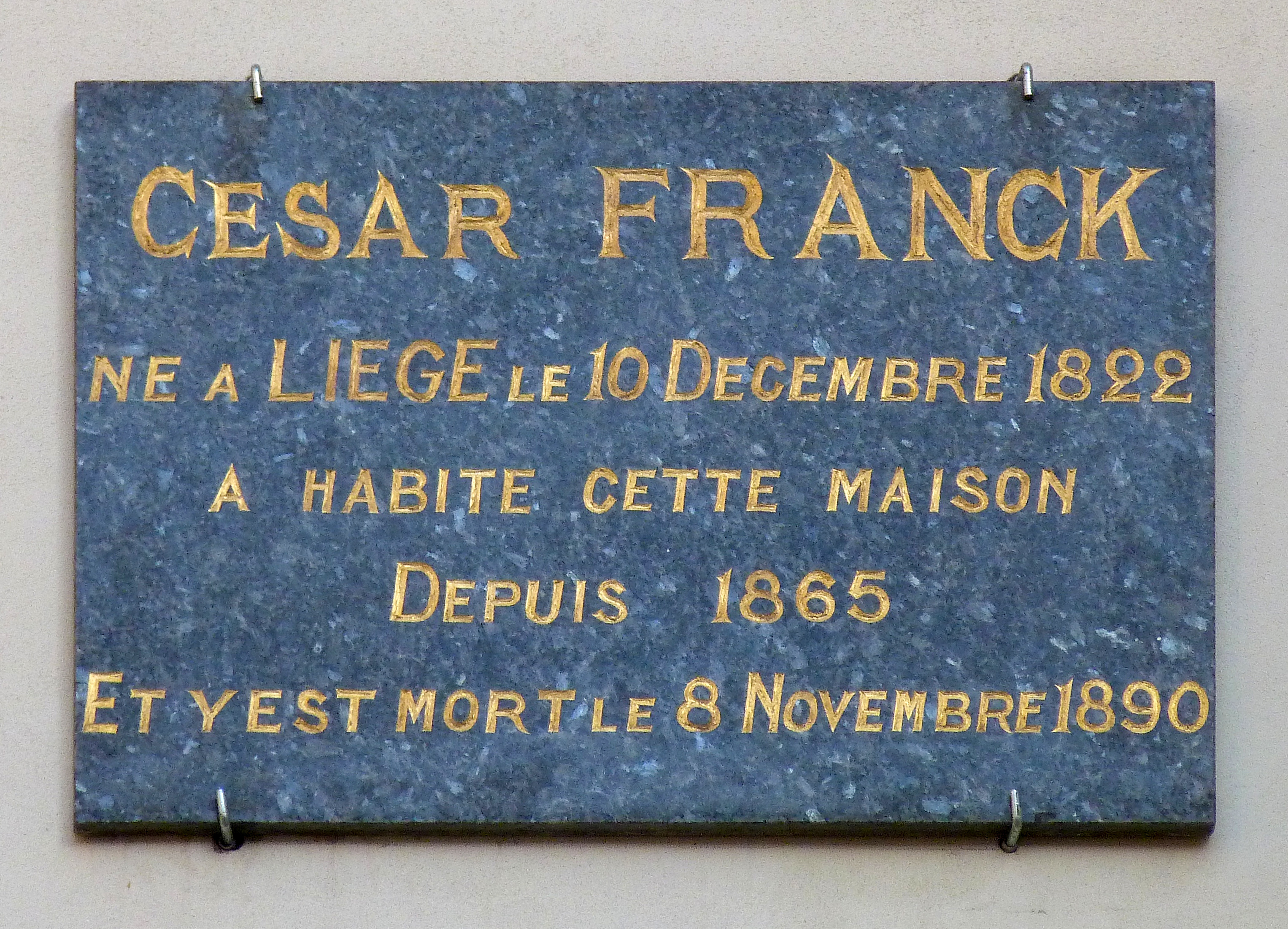 Plaque posée sur le n°95 du boulevard Saint-Michel (Paris, 5e arrond.) - César Franck (1822-1890) habita dans cette maison de 1865 à sa mort.